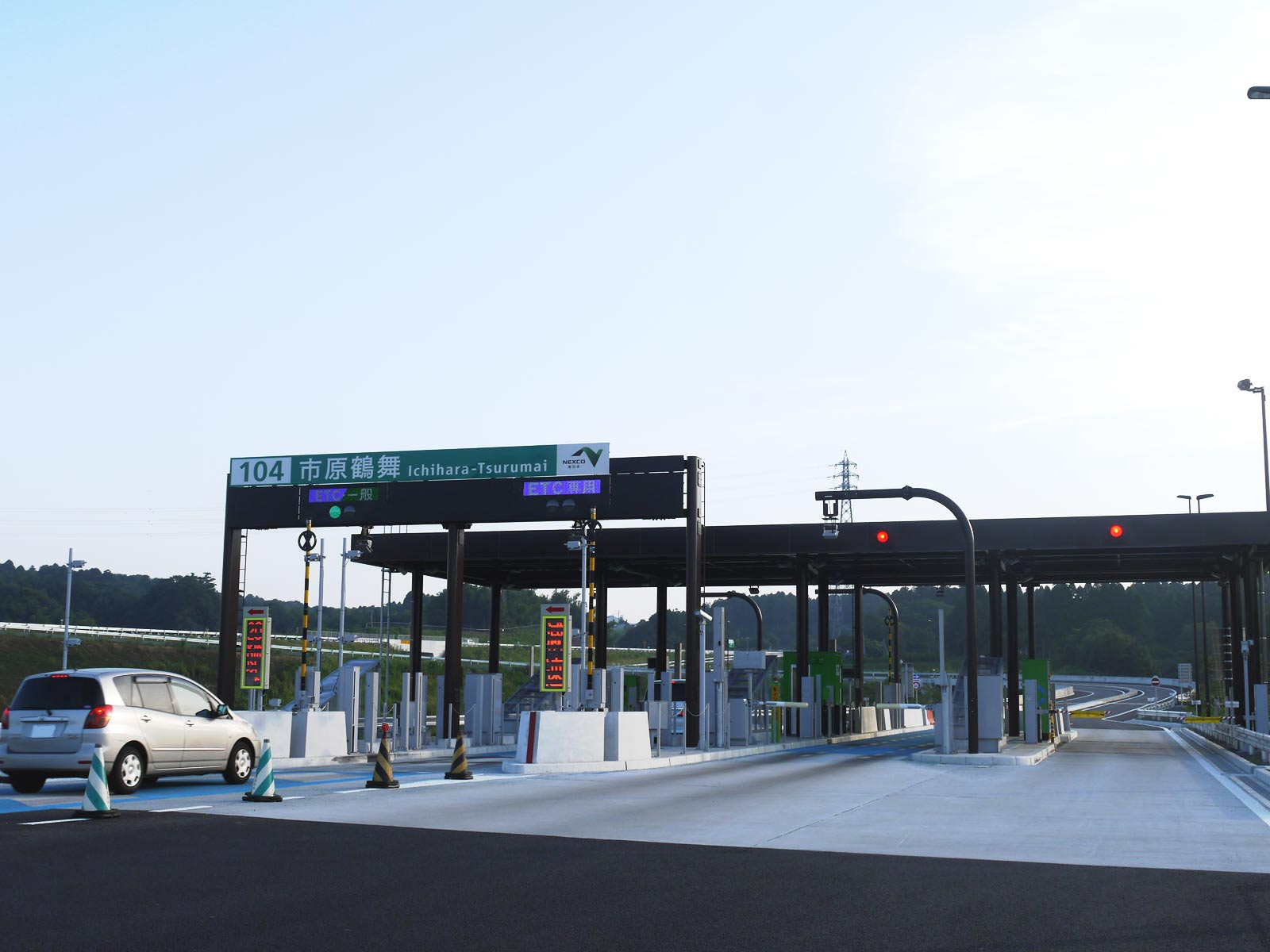 市原鶴舞IC